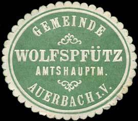 Sealing stamp Title: Gemeinde Wolfspfütz - Amtshauptmannschaft Auerbach im Vogtland Description: grün, weiß, geprägt Place: Wolfspfütz size: 3x4 cm